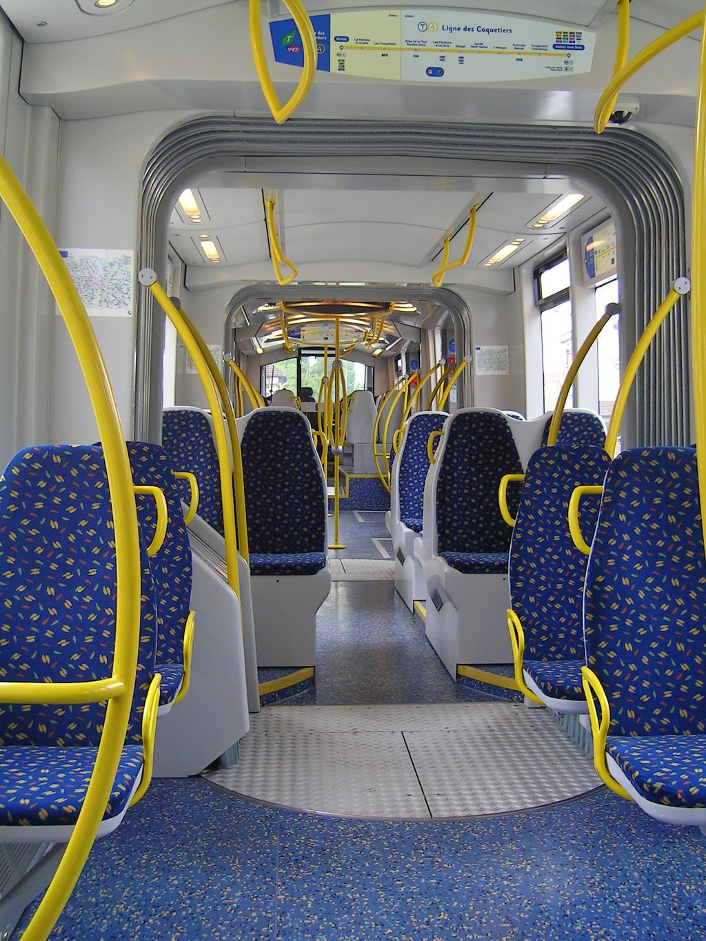 Intérieur de voiture Photo personnelle (own work) de Marianna